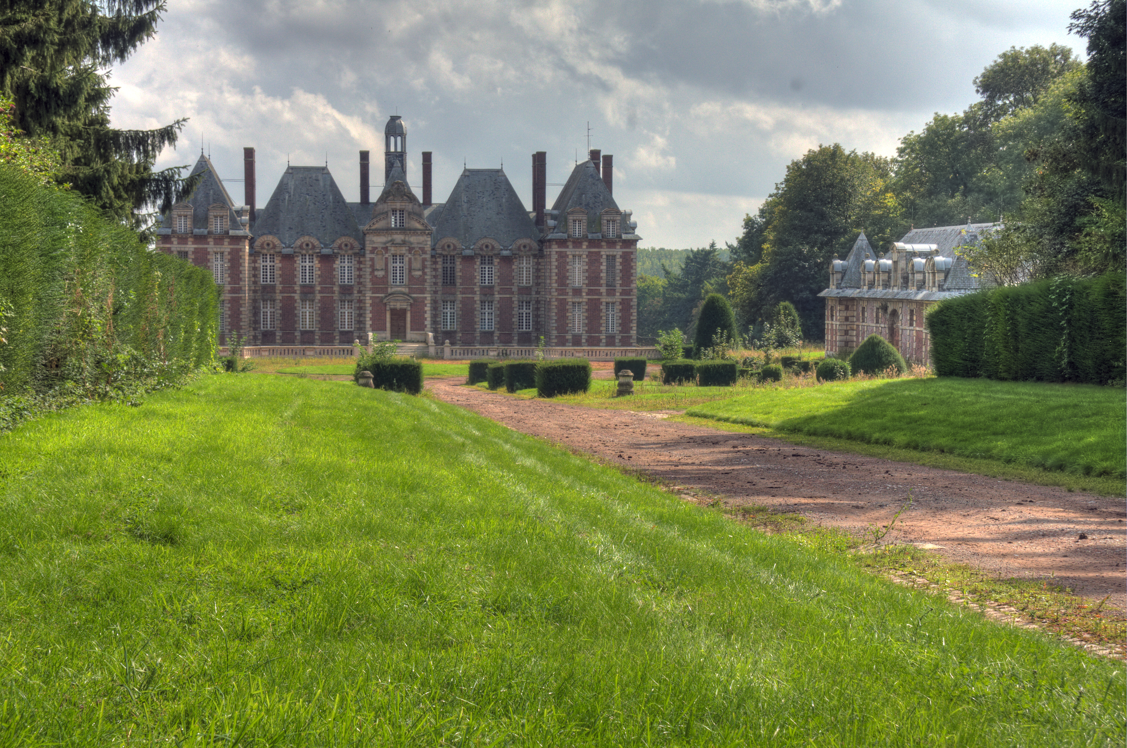 Le château d'Havrincourt et ses dépendances